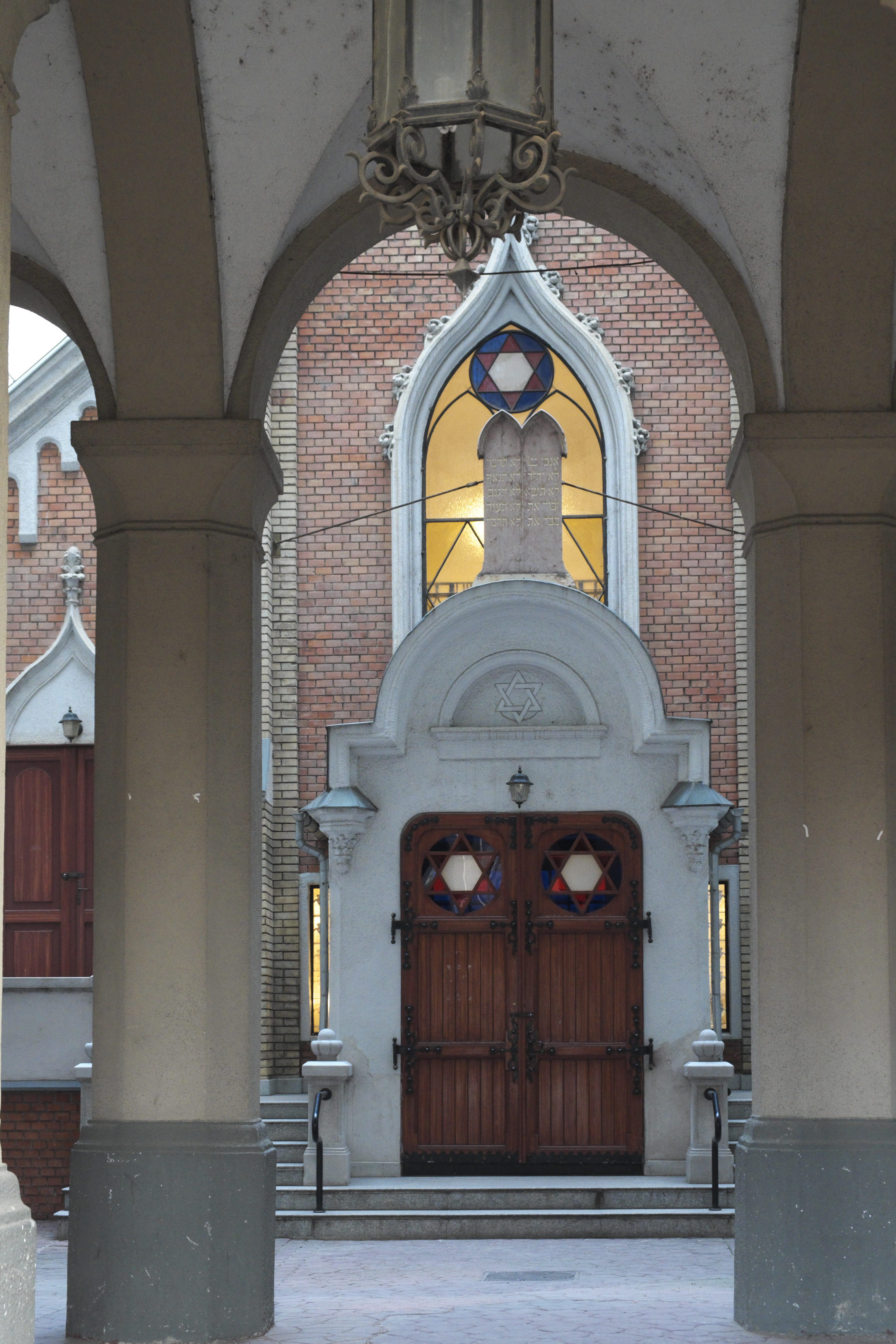 Synagoge, Frankel Leó út 49, im II. Stadtbezirk in Budapest (Ungarn)